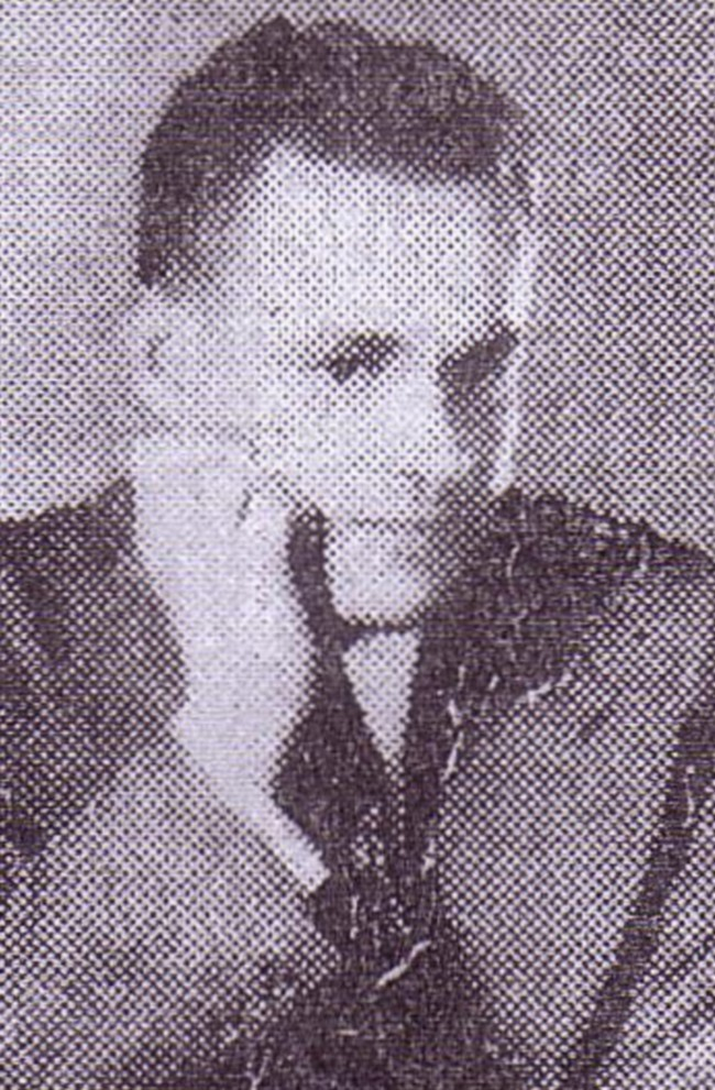 Roelf Britz